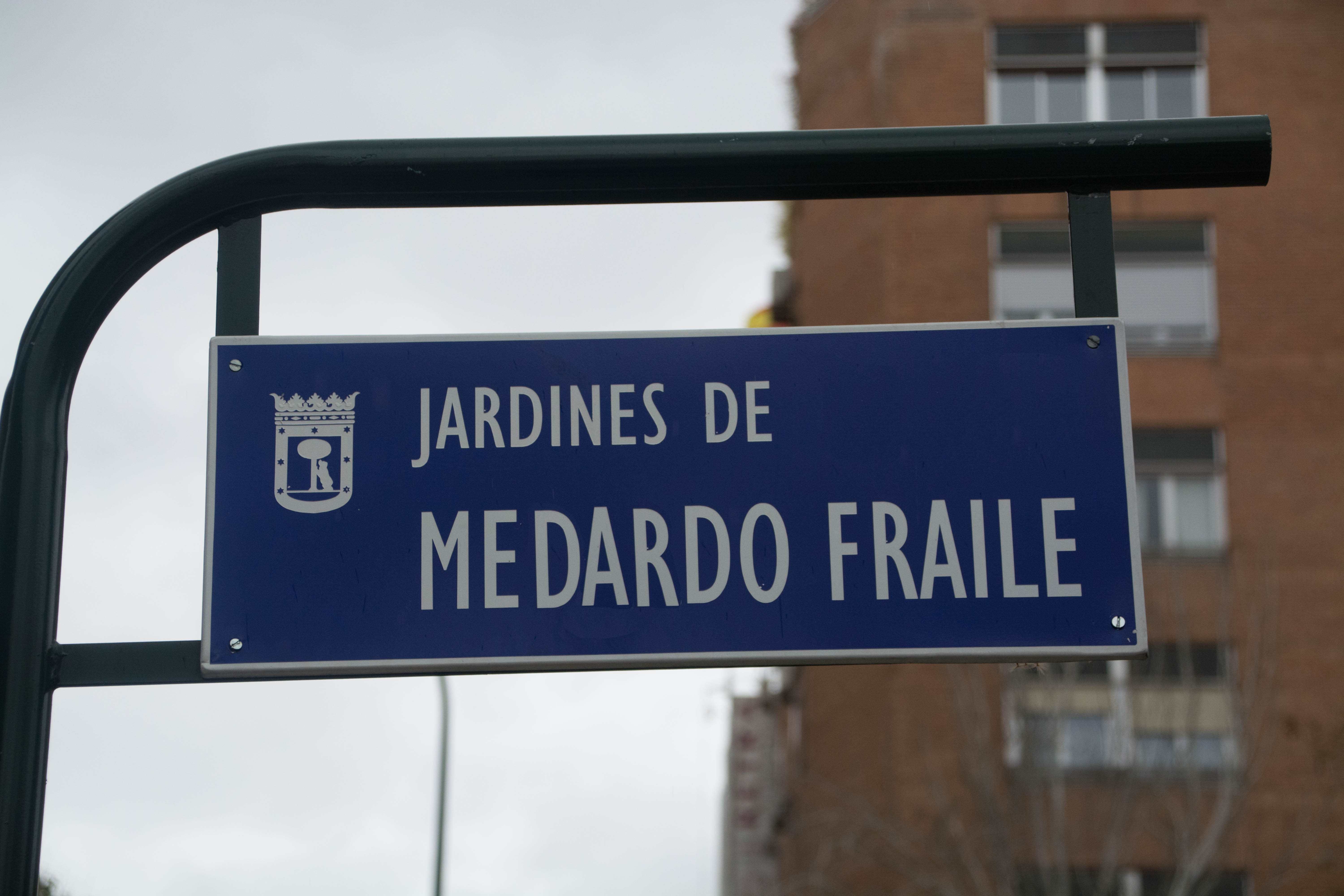 Señalización Jardines de Medardo Fraile, Madrid, España. abril 2018.